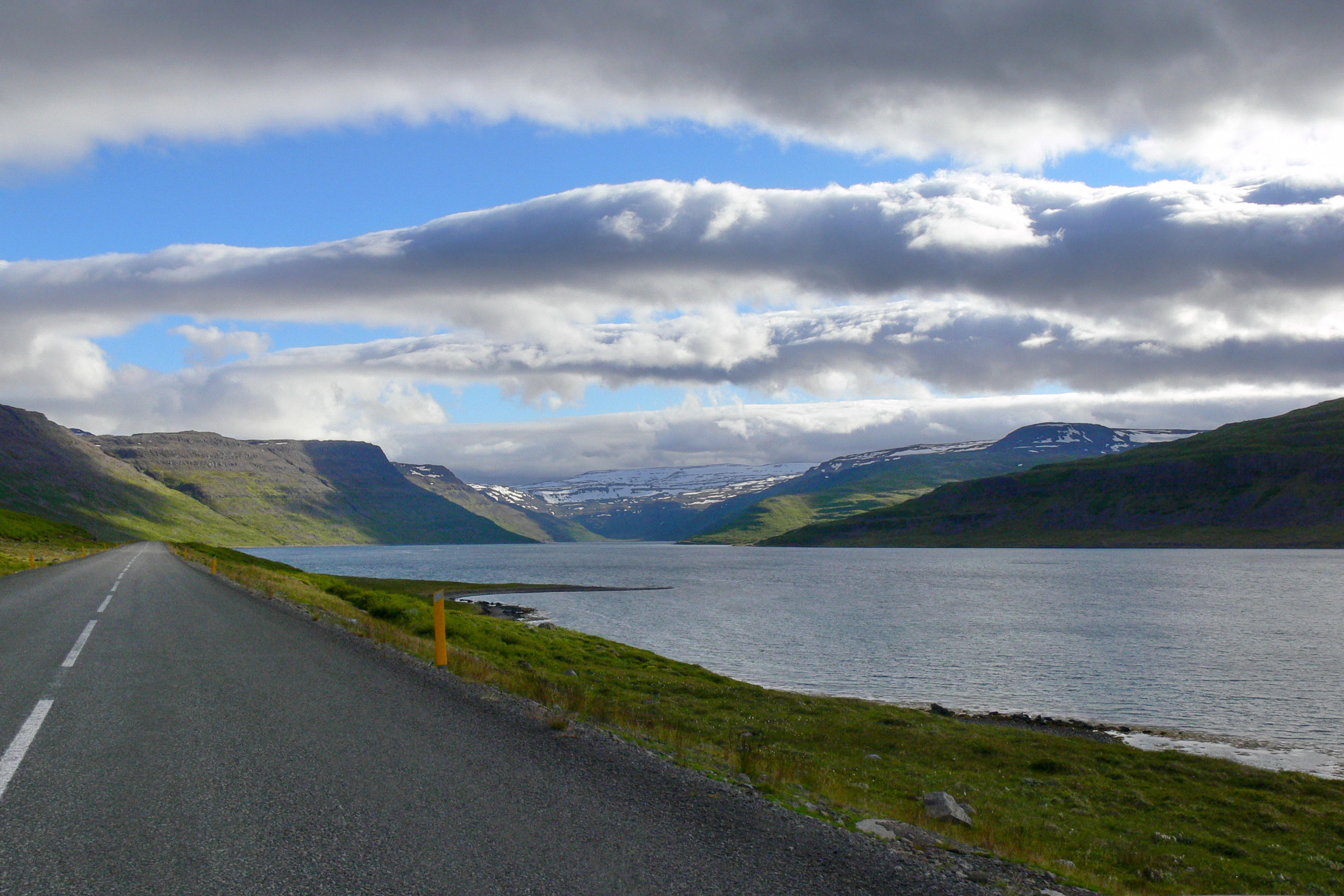 Hestfjörður, ein Seitenarm des Ísafjarðardjúp.